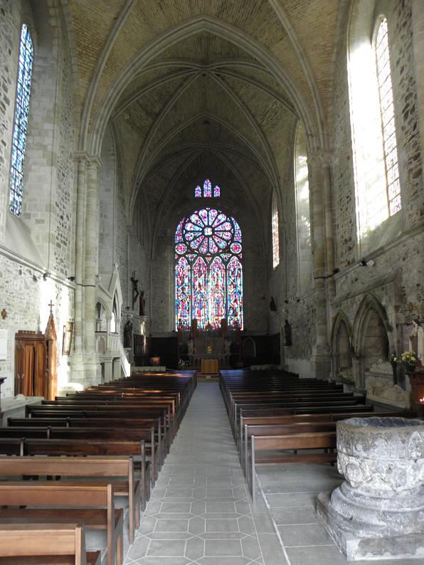 Intérieur de l'abbatiale Saint-Magloire de Léhon (22).